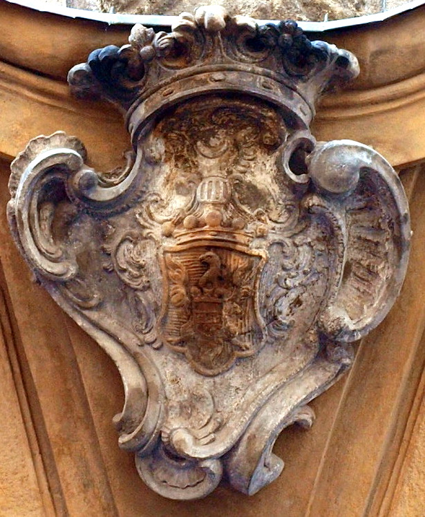 Čejkovský palác detail erbu